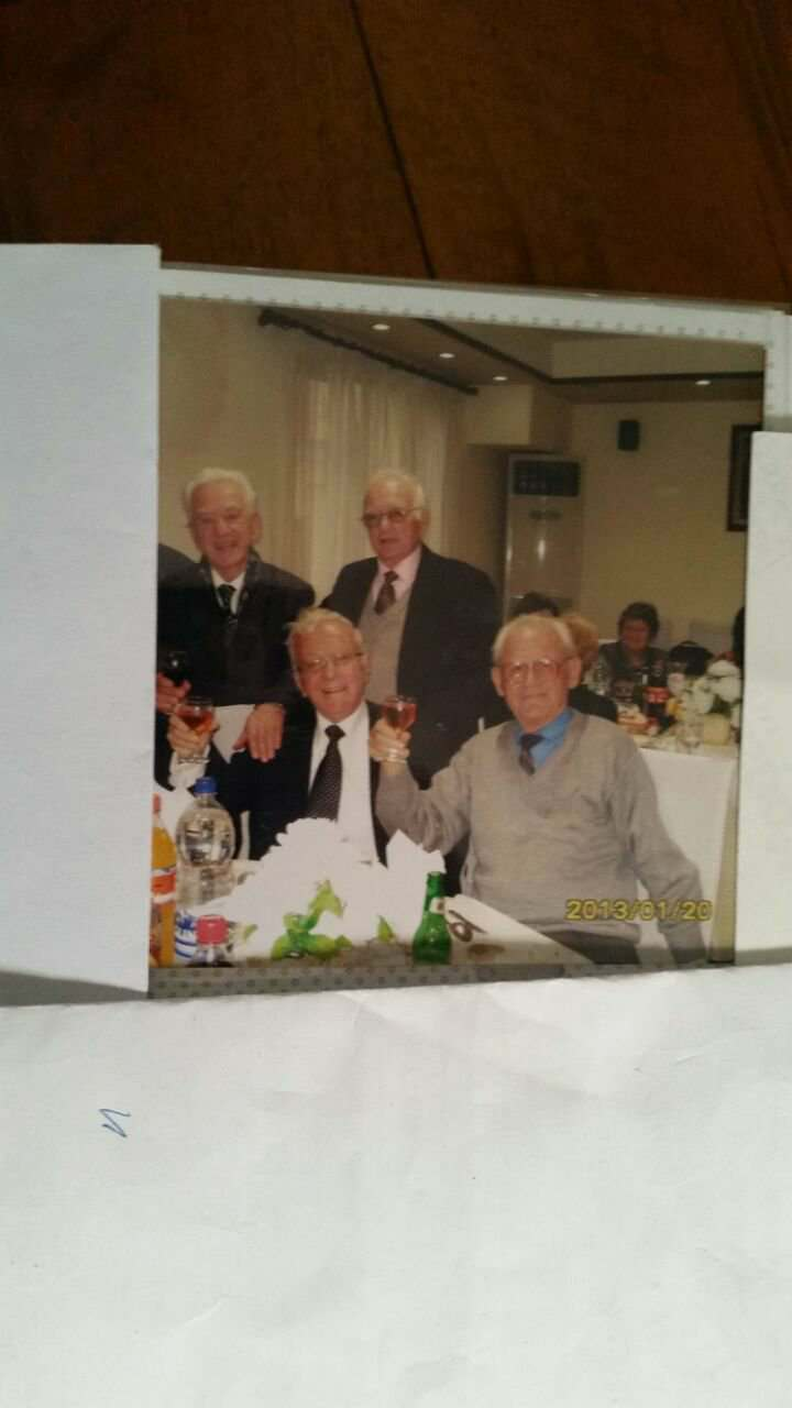 immagini 4